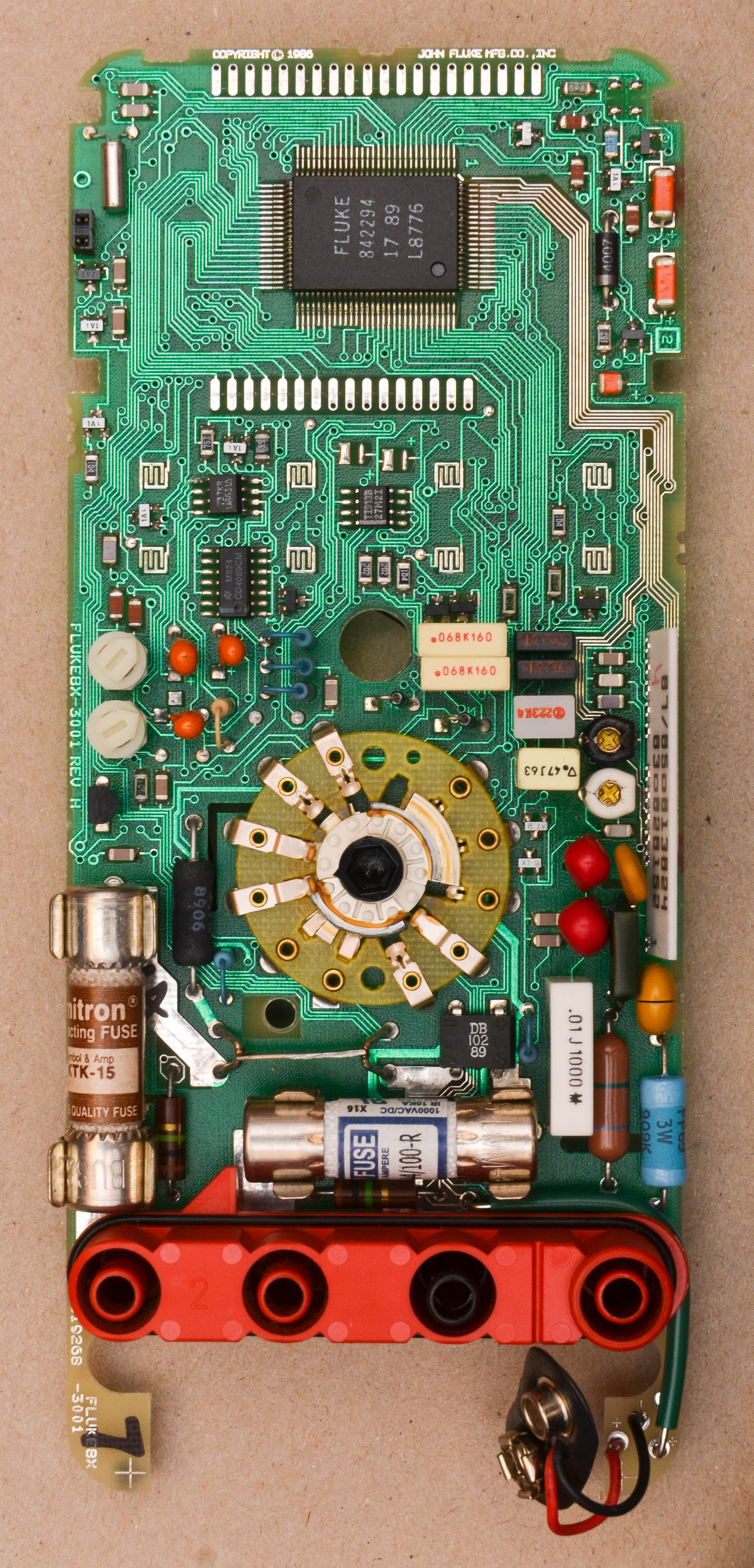 Elektronica van een Fluke 87 multimeter